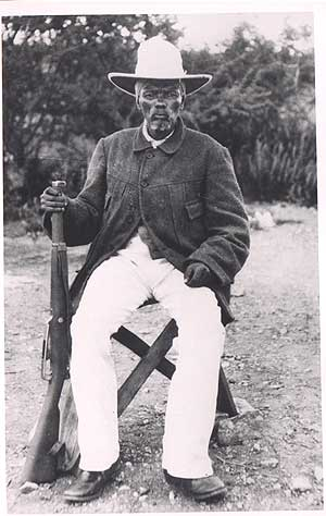 Der Nama-Führer Hendrik Witbooi, um 1900. Nach dem Tod von Witbooi im Oktober 1905 führten Jacob Marengo, Cornelius Frederiks und Abraham Morris den Guerillakampf der Nama gegen die deutsche Schutztruppe fort.